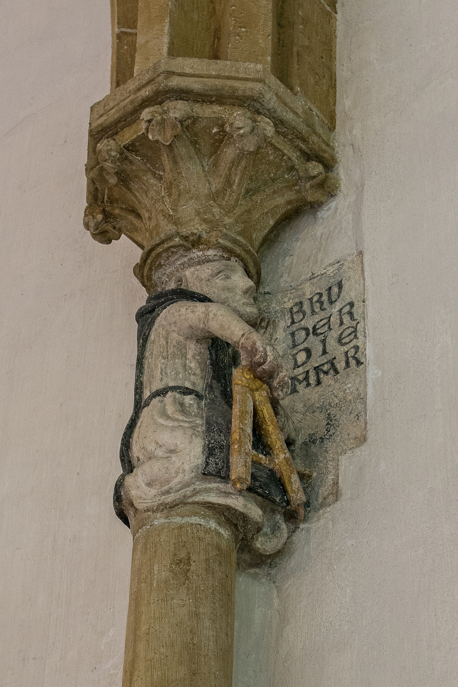 Die ehemalige Dominikanerkirche St. Blasius wurde von ca. 1246 bis 1384 erbaut (Chorbau vor 1246-79, Langhaus um 1280-1384). Sie ist die größte Kirche der Bettelorden in Süddeutschland. Die Konsolfigur des Bruders Diemar im nördlichen Nebenchor stammt aus der zweiten Hälfte des 13. Jahrhunderts. Er gilt als Bauleiter der Kirche. Die Inschrift mit seinem Namen ist die älteste Inschrift in deutscher Sprache in Regensburg. Die Bauplastik ist eines der Highlights von St. Blasius. D-3-62-000-24This is a photograph of an architectural monument.